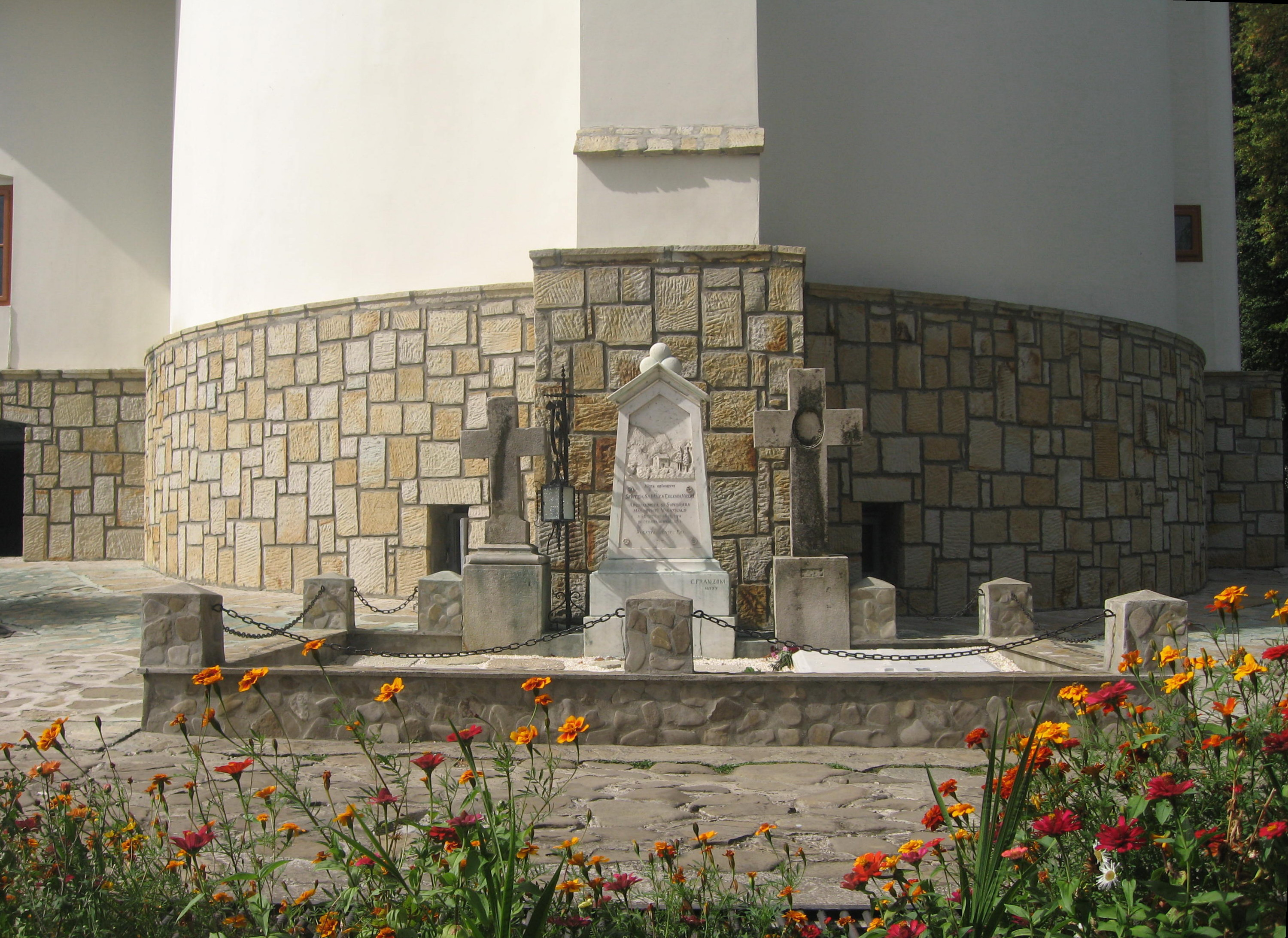 Mănăstirea Văratec